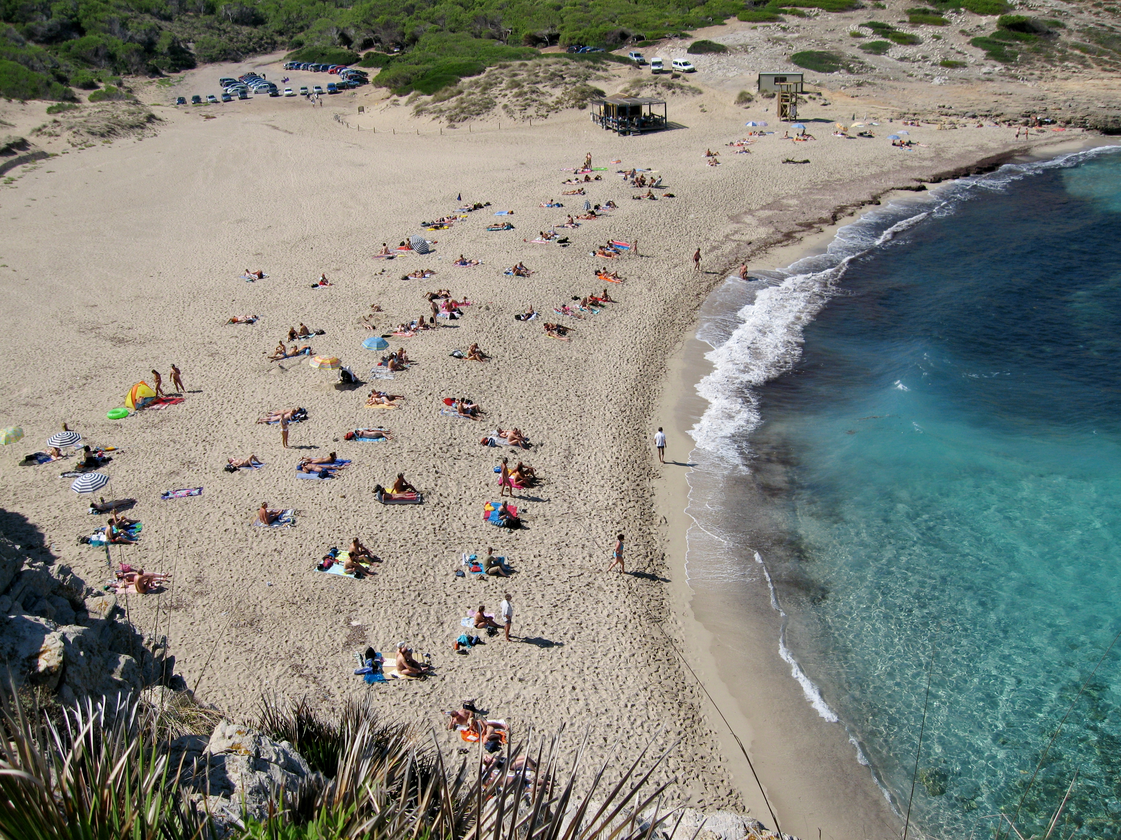 Cala Torta, Gemeinde Artà, Mallorca, Spanien